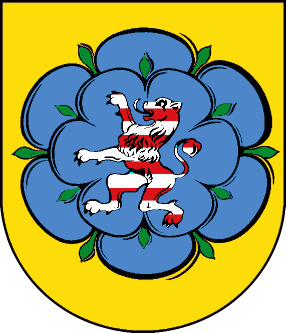 Wappen von Sontra